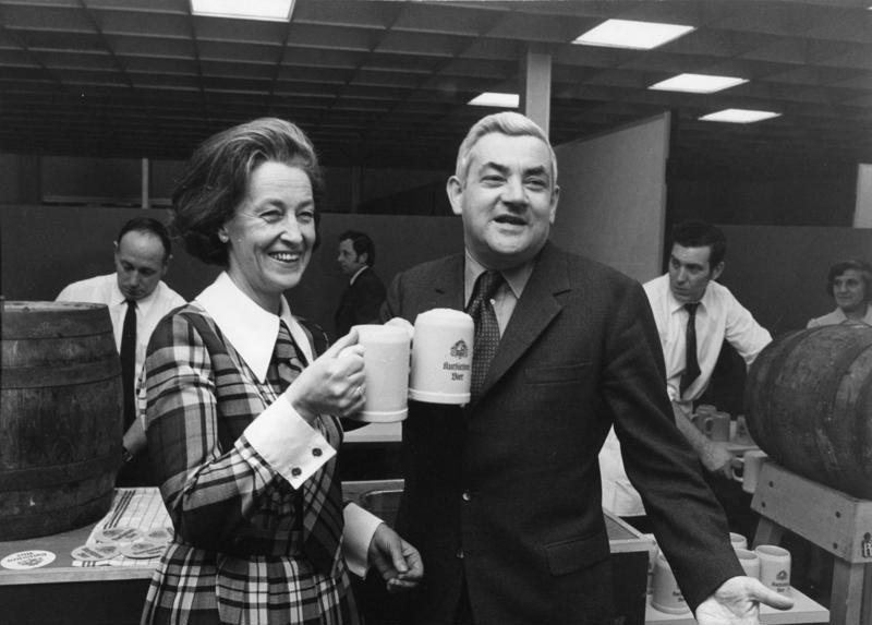 Bonn, 7.12.72 Nickolausfeier im Bundeskanzleramt (Bundesministerin Katharina Focke und Bundesminister Horst Ehmke).